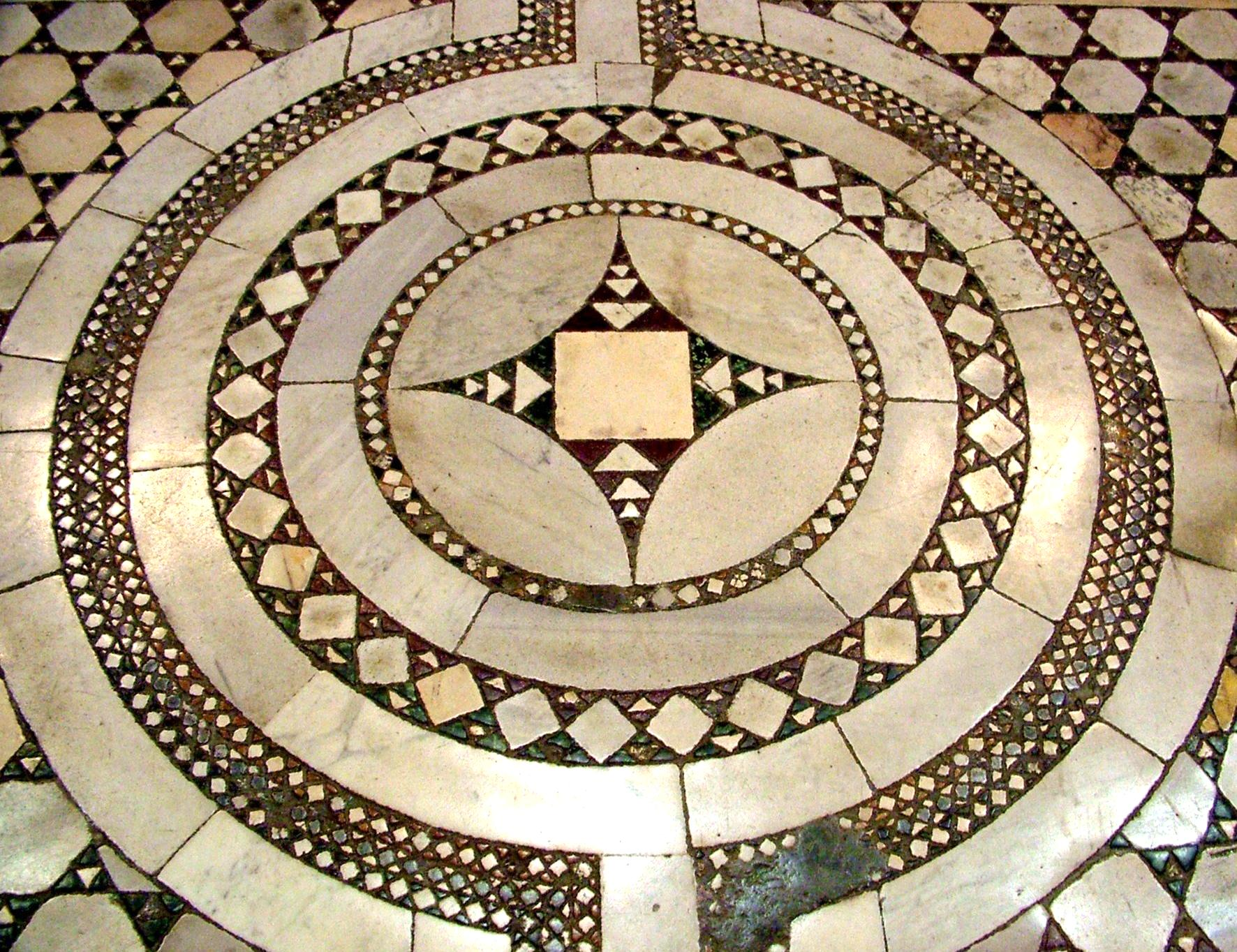 Cosmata mozaikpadló, Santa Maria Maggiore (Róma)